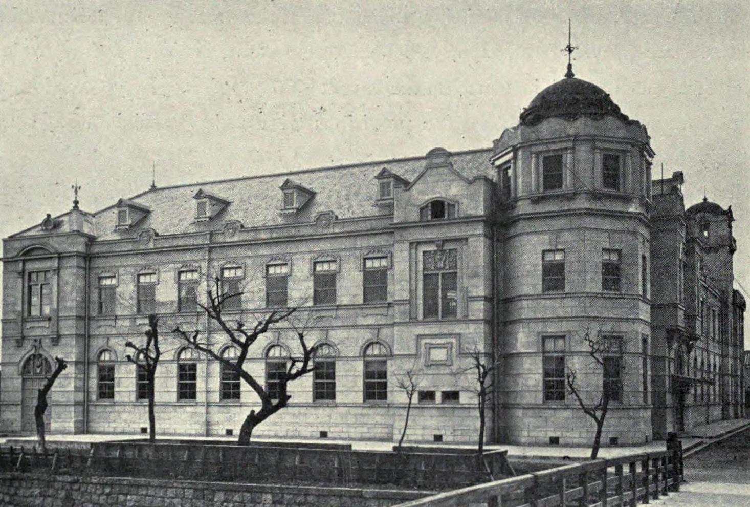 住友銀行 明治時代